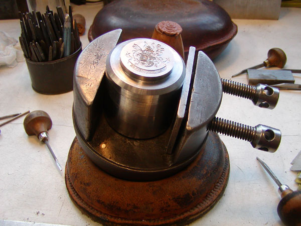 Door de graveur vervaardigde staalmatrijs voor het persen van penningen.